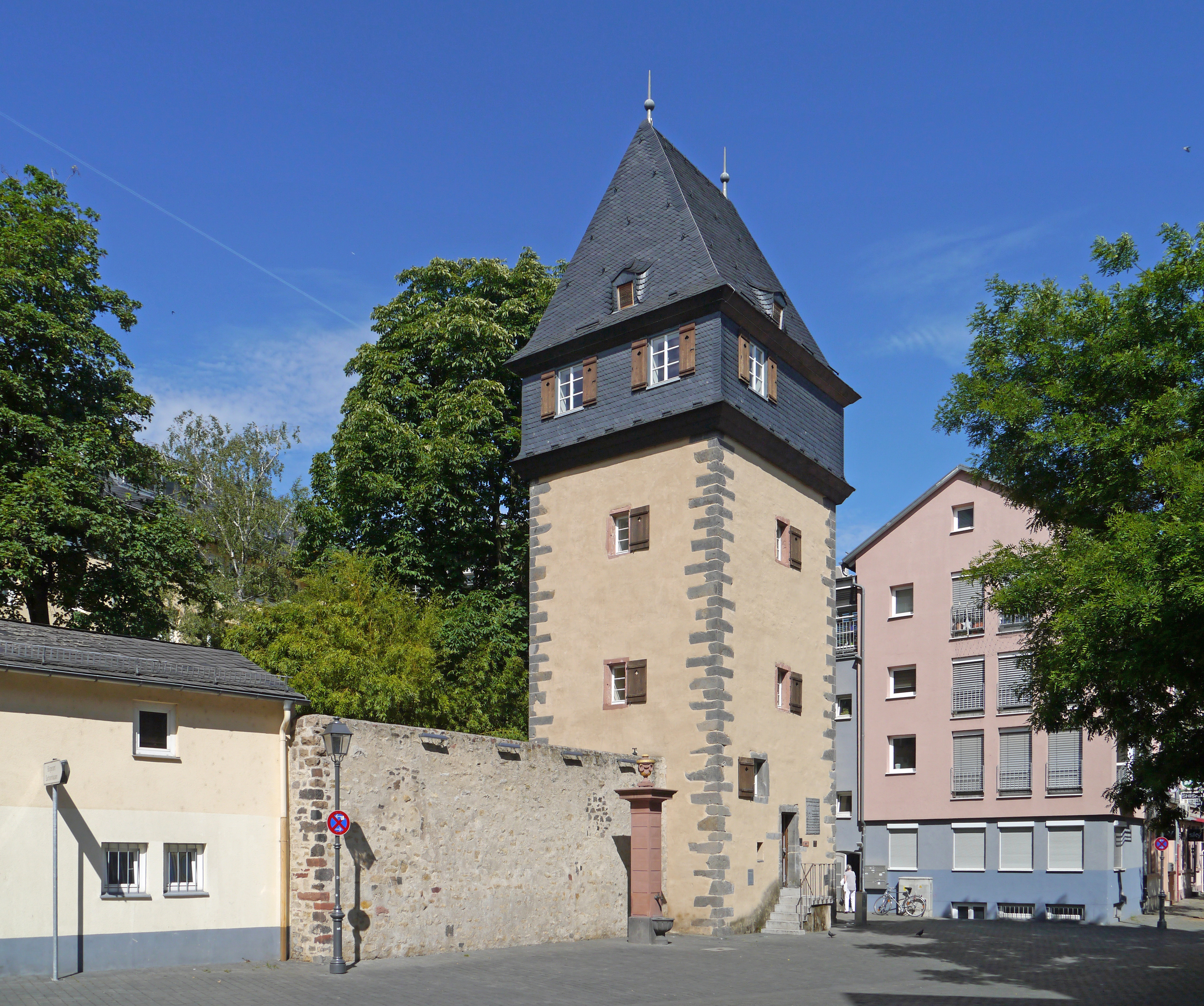 Der Kuhhirtenturm in der Großen Rittergasse, 2017 in Frankfurt-Sachsenhausen.